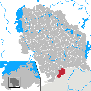 Suckow in Mecklenburg-Vorpommern - District Parchim